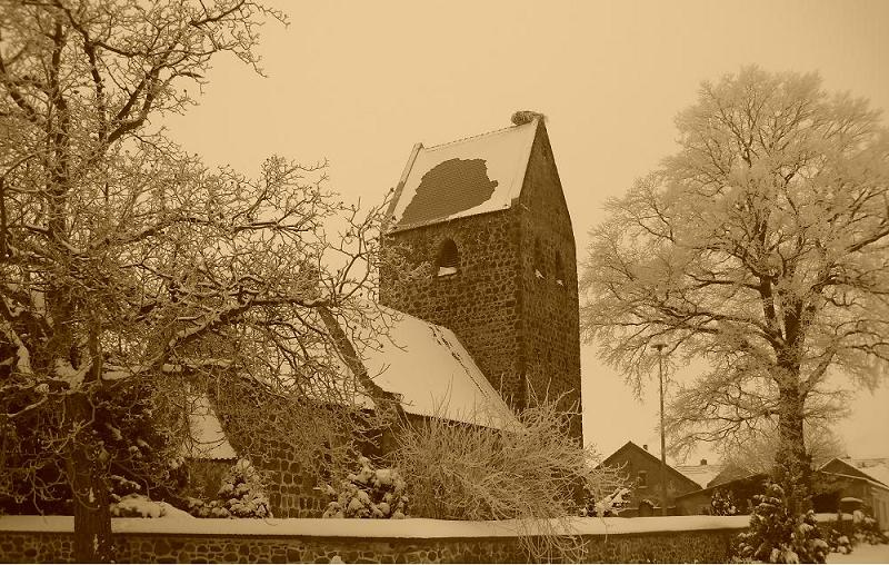 Die Elversdorfer Kirche Anfang 2010 mit Schnee bedeckt.